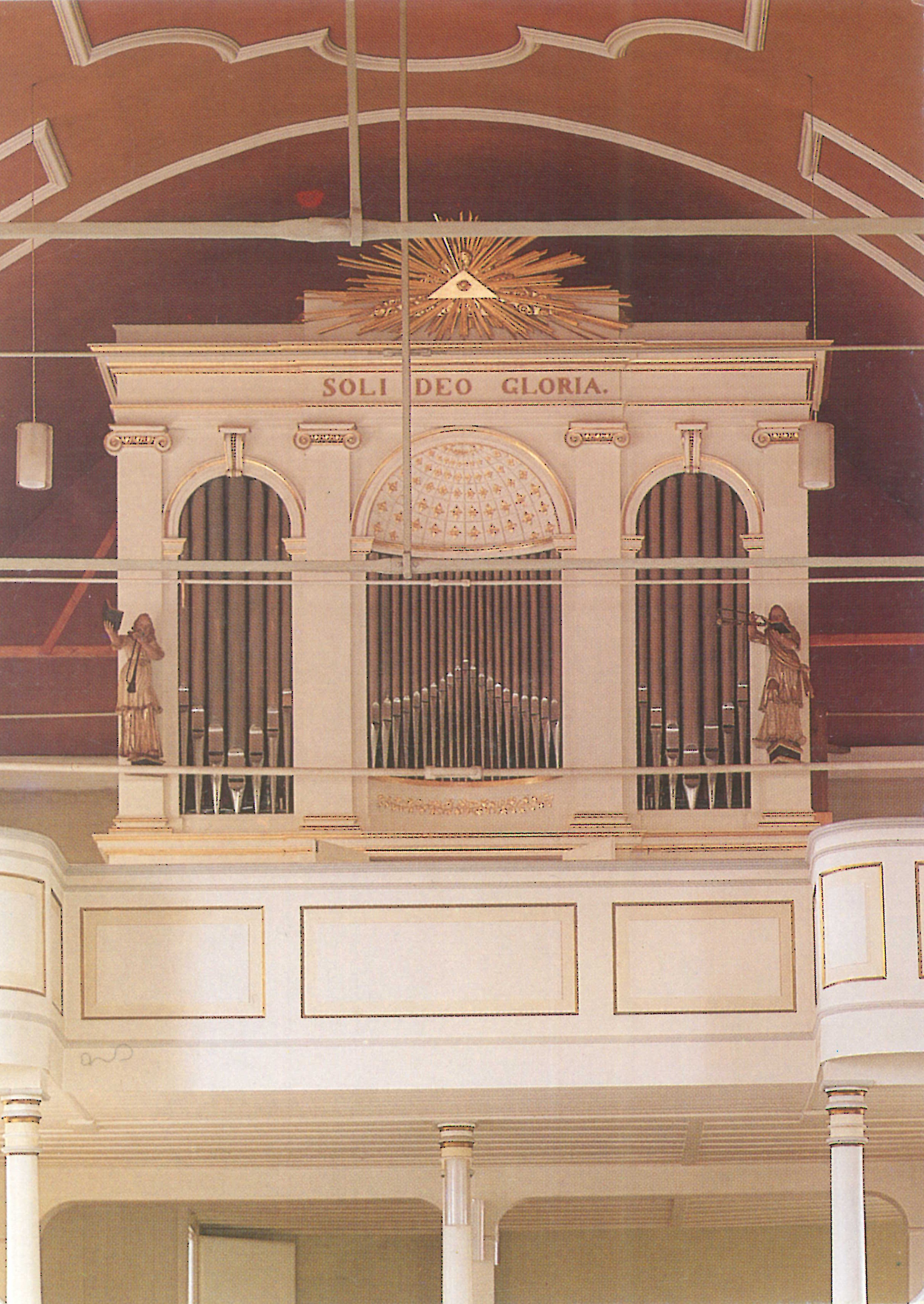 Orgel in Osterode, St. Jacobi